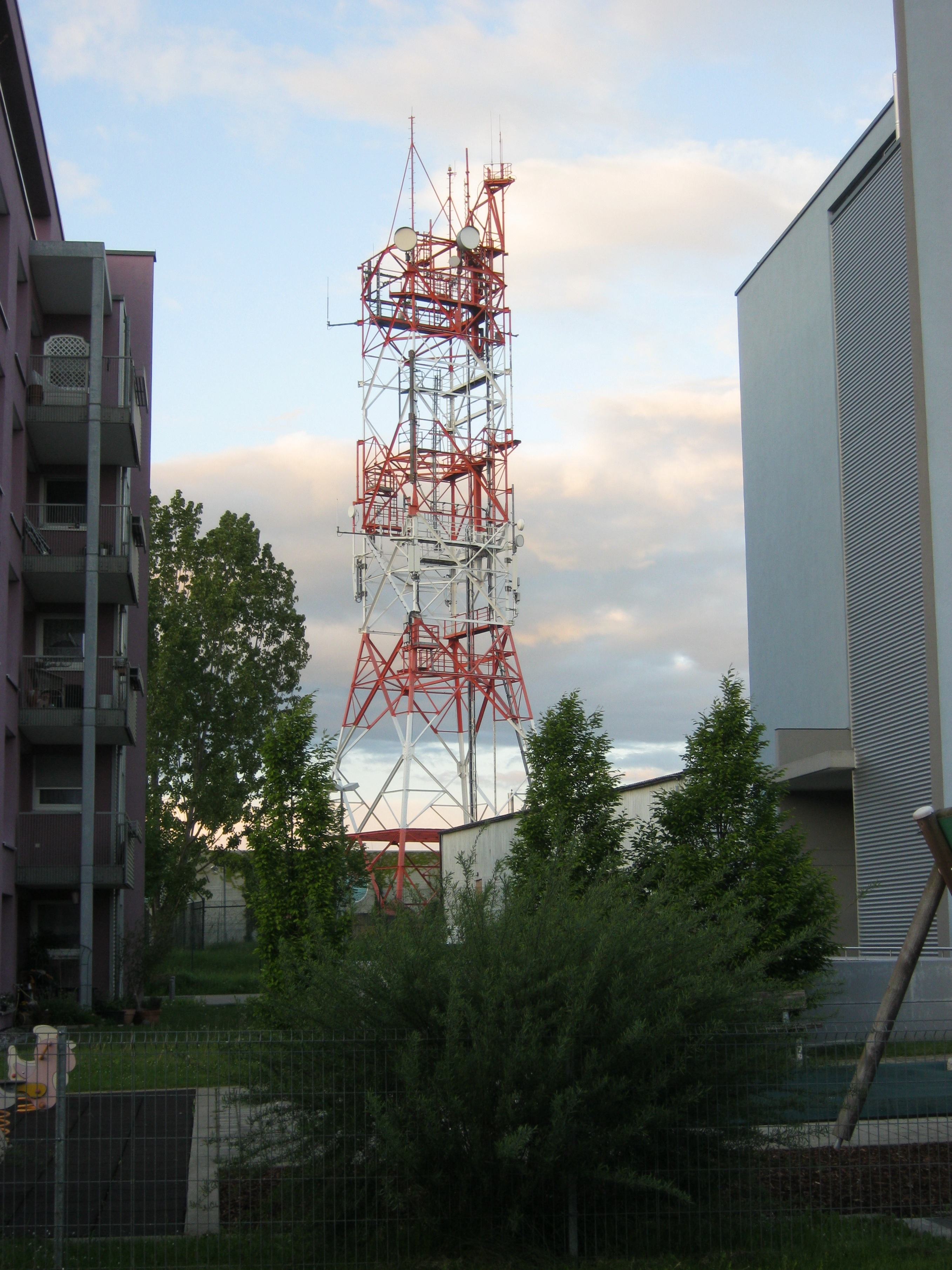 Deitsch: Richtfunkturm Stuttgart-Burgholzhof - OpenStreetMap(Info)